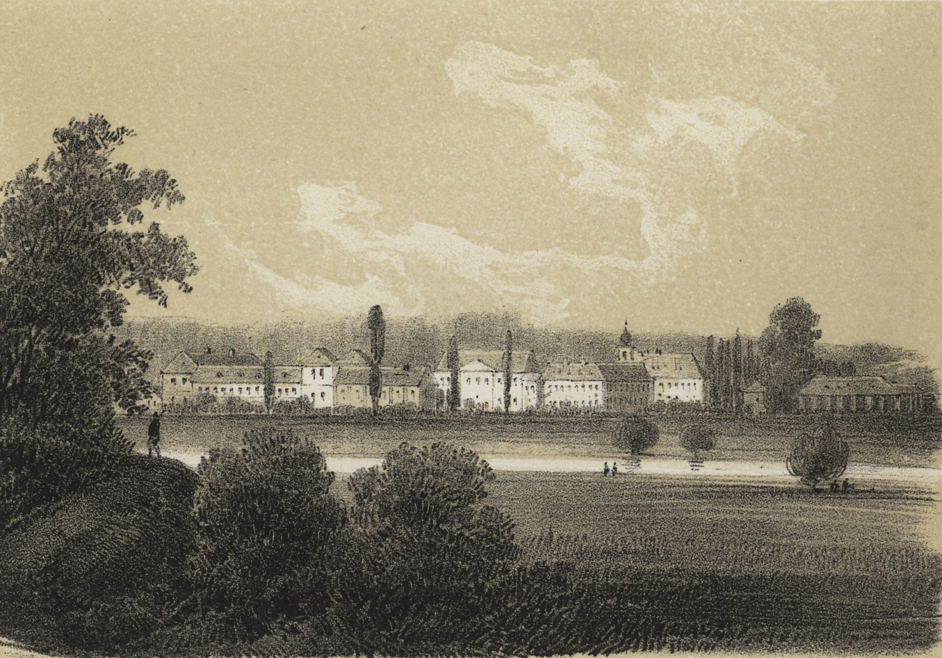 Hřebčín u Kladrub